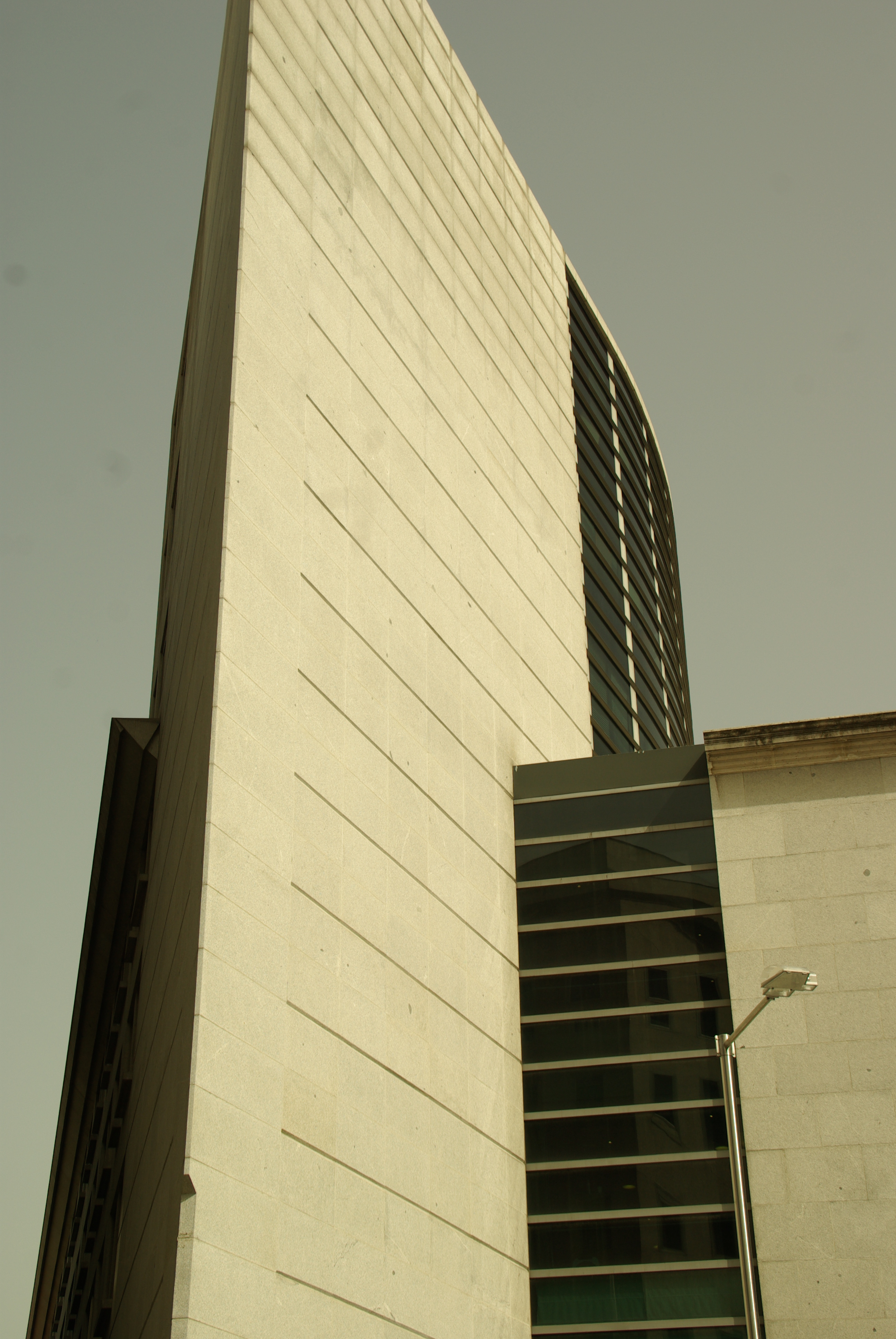 ® MADRID E.U.S. CONGRESO DE LOS DIPUTADOS